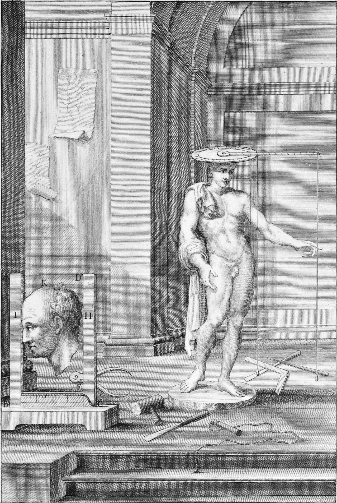 Stampa calcografica da Alberti, Leon Battista, Della architettura della pittura e della statua, Bologna, 1782. Tavole fuori testo; Tavola 69.